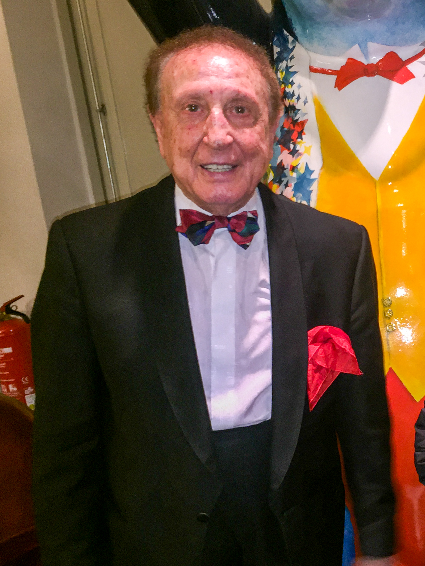 Igor Jedlin nach einer Vorstellung in seinem Theater in der Roscherstraße 7, Berlin